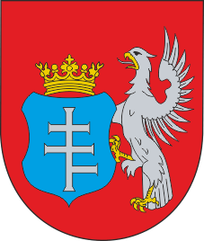 Історичний герб с. Верхівка (Тростянецький район) 1761 року